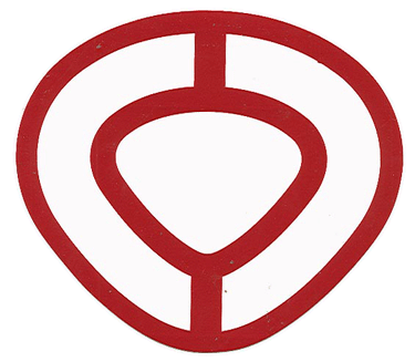 logo c1rca